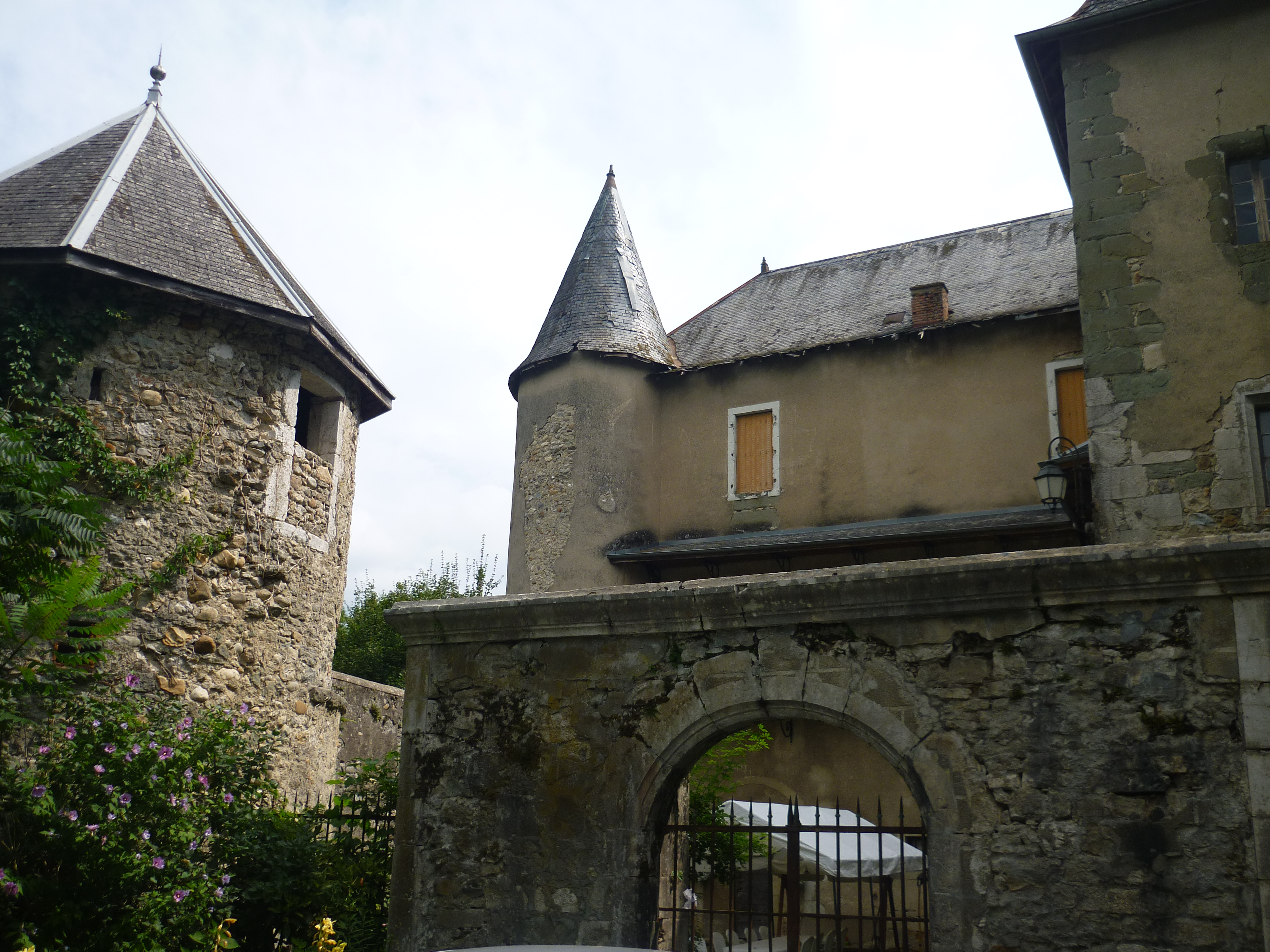 Château de Lornay (Haute-Savoie, France)